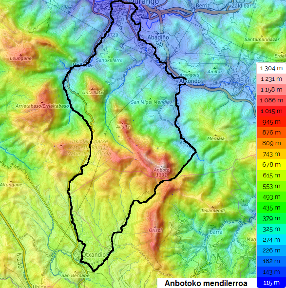 Anbotoko mendilerroaren mapa topografikoa.